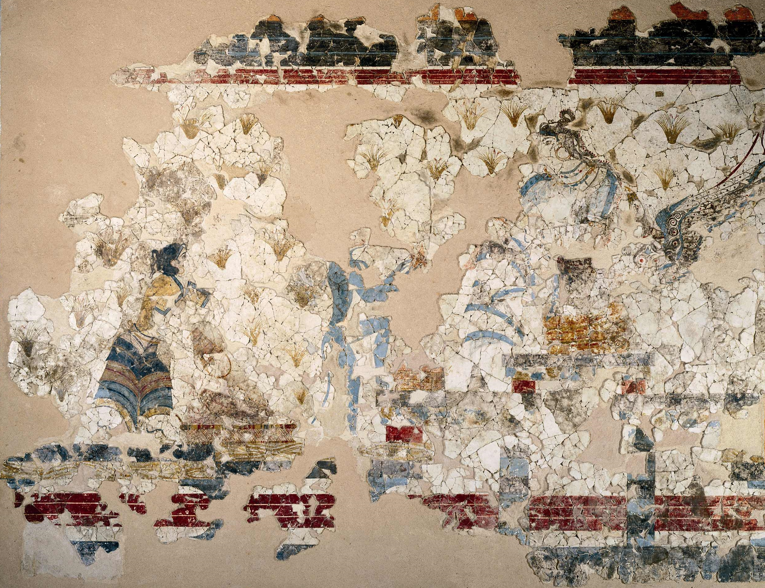 Fresko einer auf einem Thron sitzenden Frau, mit einer Adorantin und einem Affen vor ihr sowie einem Greif hinter ihr, von der Nordwand von Raum 3 des Obergeschosses von Xesti 3 der Ausgrabungsstätte in Akrotiri auf Santorin, Kykladen, Griechenland